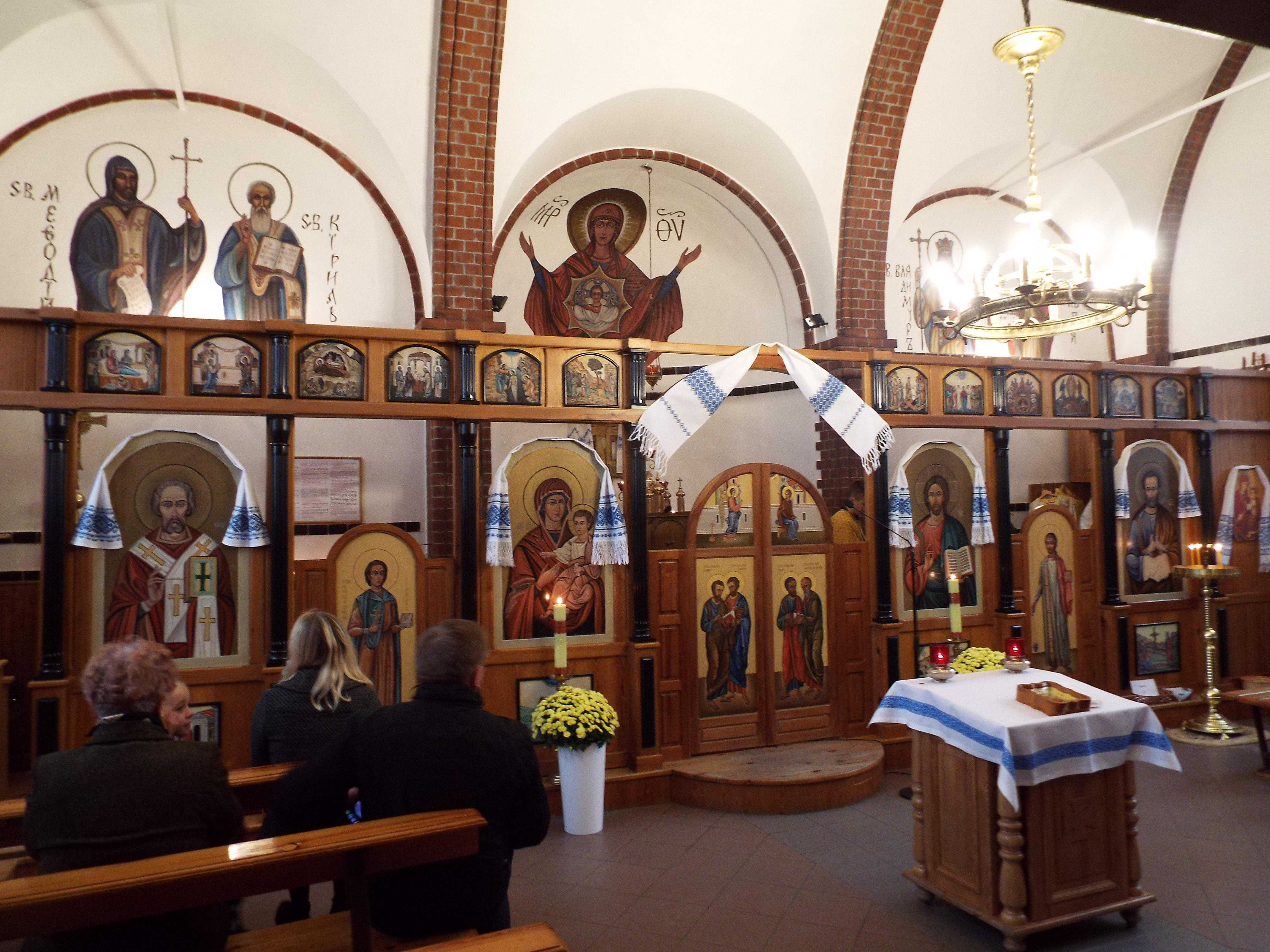 Elbląg, ul. Traugutta 15 - pierwotnie ewangelicka kaplica cmentarna p.w. św. Anny, obecnie cerkiew greckokatolicka św. Jana Chrzciciela, 1902 (wnętrze)